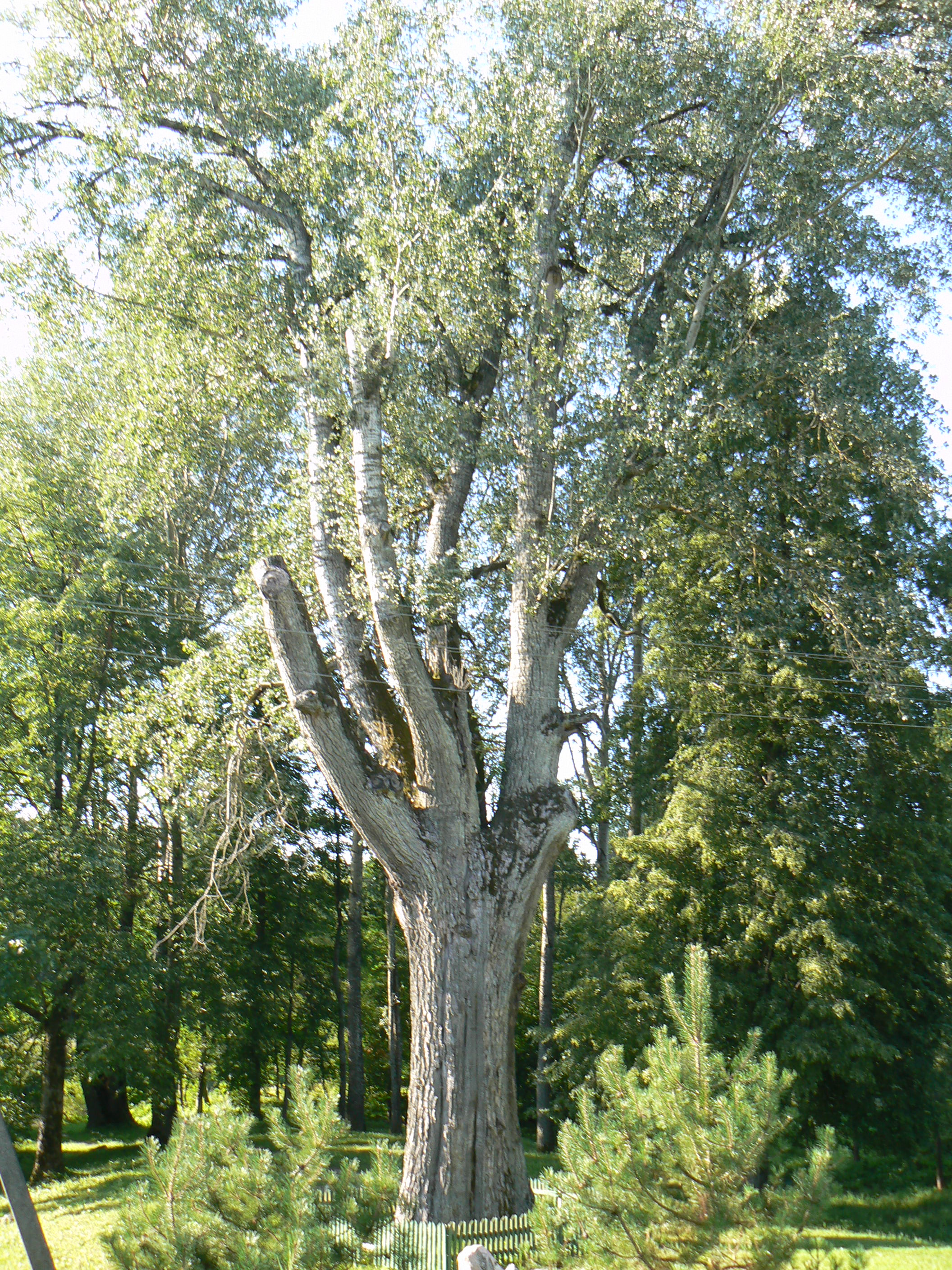 Památný topol (Populus alba) v Pajūrisu, mezi kostelem Nejsvětější Trojice (Švenčiausios Trejybės bažnyčia) a říčkou Nemylas (na jejím levém břehu)